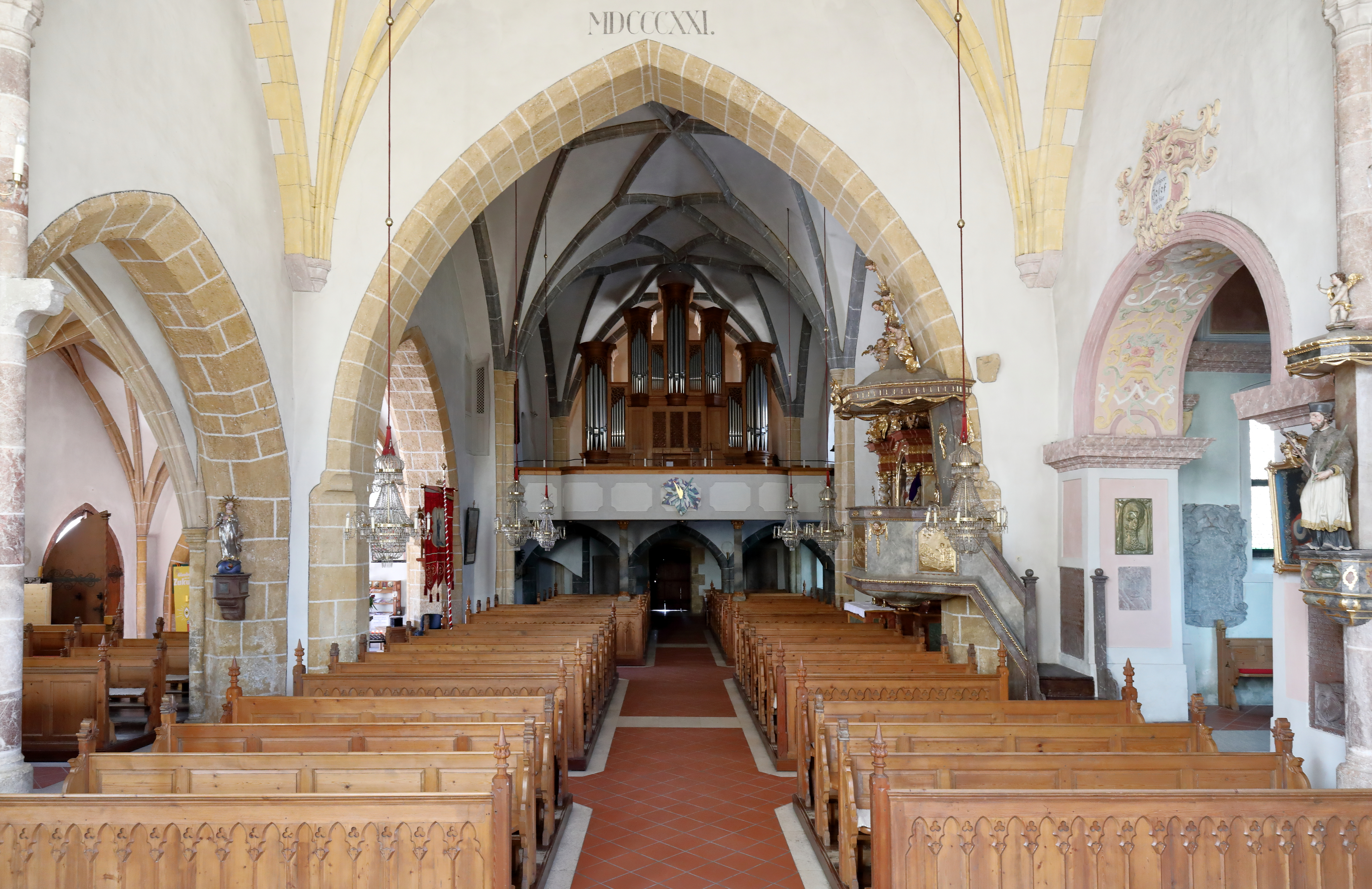 Innenansicht der röm.-kath. Pfarrkirche St. Paul in Richtung Orgelempore in der steirischen Stadtgemeinde Bad Aussee.Ursprünglich eine romanische Kirche mit einem Chorturm. Im 15. Jahrhundert wurde sie umgebaut und erweitert.